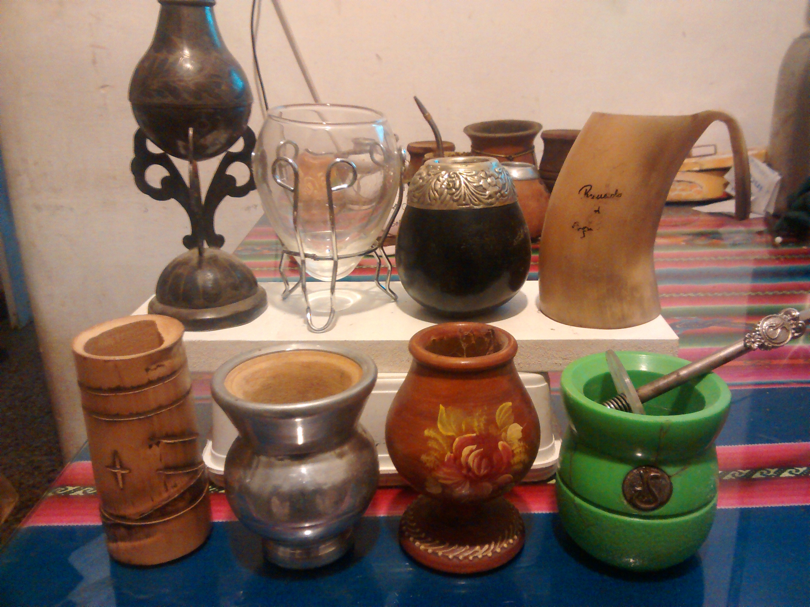 diferentes tipos de mate